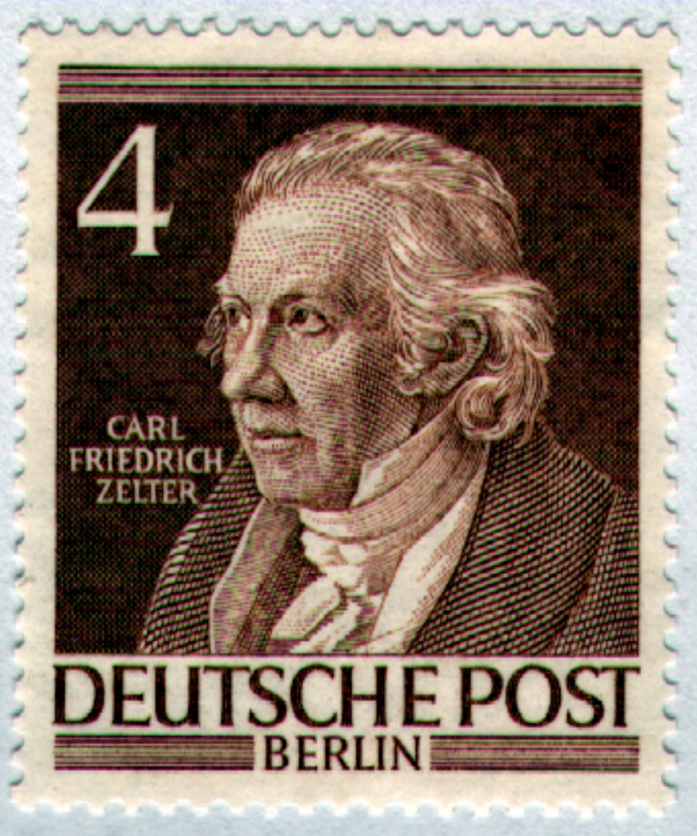 Carl Friedrich Zelter, 2. Direktor der Sing-Akademie zu Berlin, herausgegeben im 120. Todesjahr, Berlin 1952